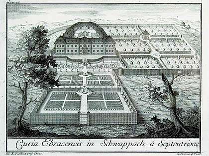 Schloss Oberschwappach, ehemaliges Schloss des Klosters Ebrach in der heutigen Gemeinde Knetzgau